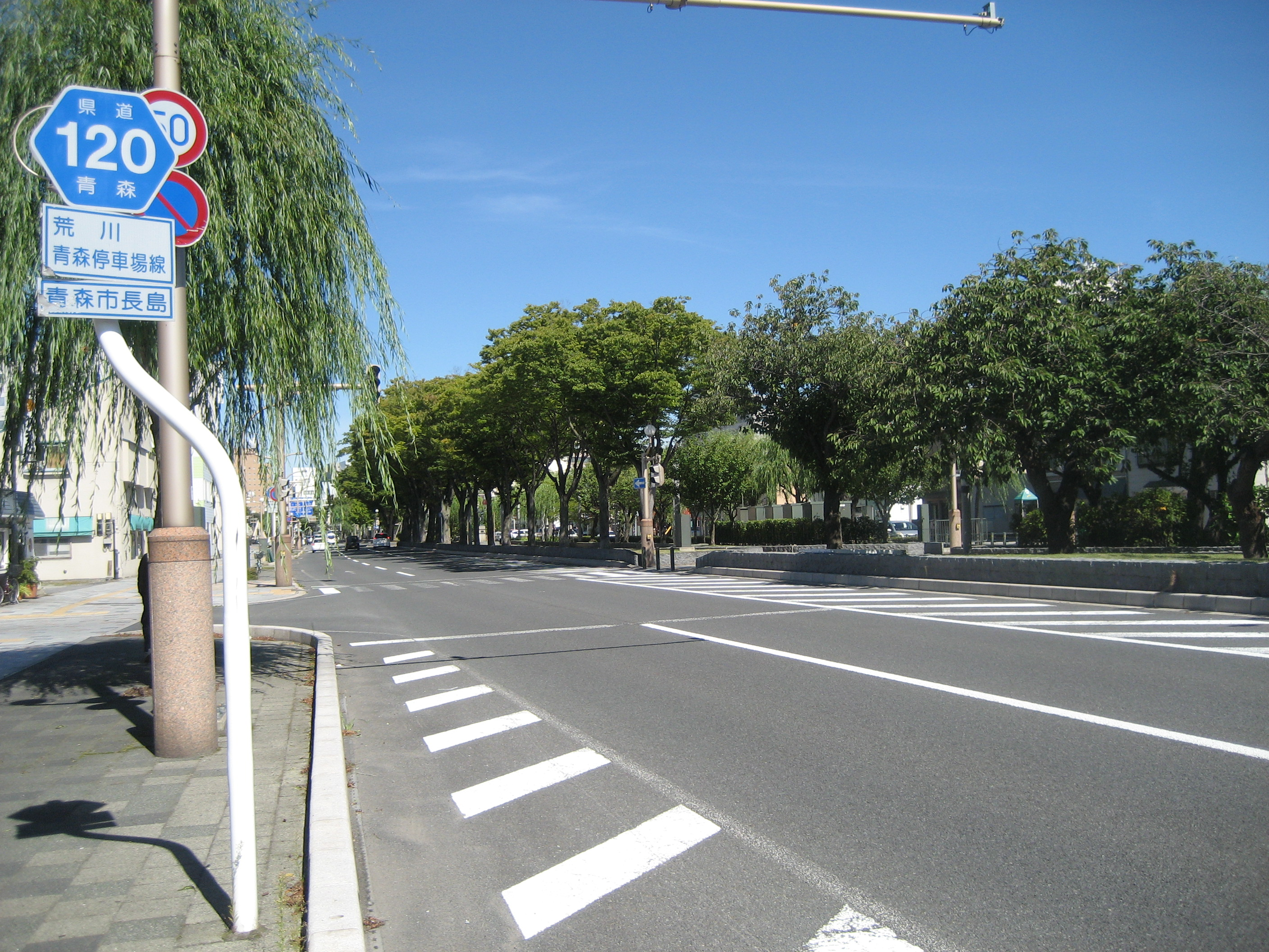 青森県道120号線青森市長島付近